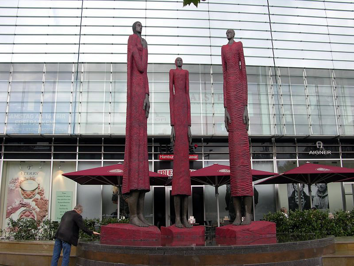 Skulpturengruppe Mimir-Brunnen von Zoyt von 2006 vor dem Alstertal-Einkaufs-Zentrum ("AEZ"), Hamburg-Poppenbüttel.